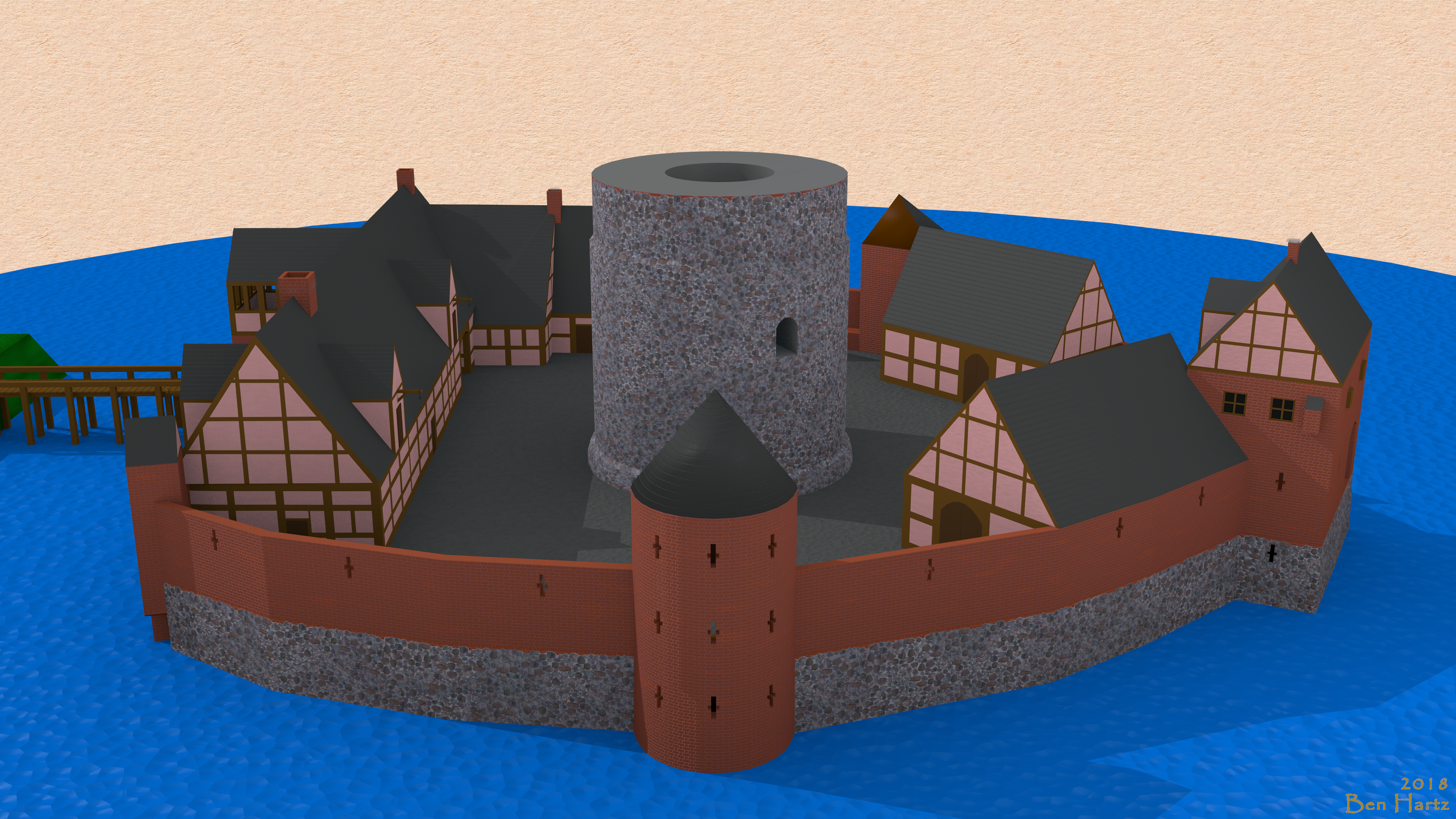 Computermodell des Amtshauses Vechta von 1689, kurz vor dem Abriss. Basis für das Modell ist ein Grundplan aus dem Jahr 1683 und die Seitenansicht aus dem Jahr 1689. Die Darstellung entspricht der Seitenansicht und ist wie diese "freigestellt", es fehlen also umliegende Strukturen, wie die angrenzenden Festungwälle und der Wasserstand ist extrem niedrig. Das Amtshaus wird oft für die Burg Vechta gehalten, diese wurde aber 1538 zerstört und aus machtpolitischen Gründen nicht wieder aufgebaut. Das Amtshaus wurde in ihren Ruinen errichtet und übernahm die Verwaltungsfunktionen der Burg.